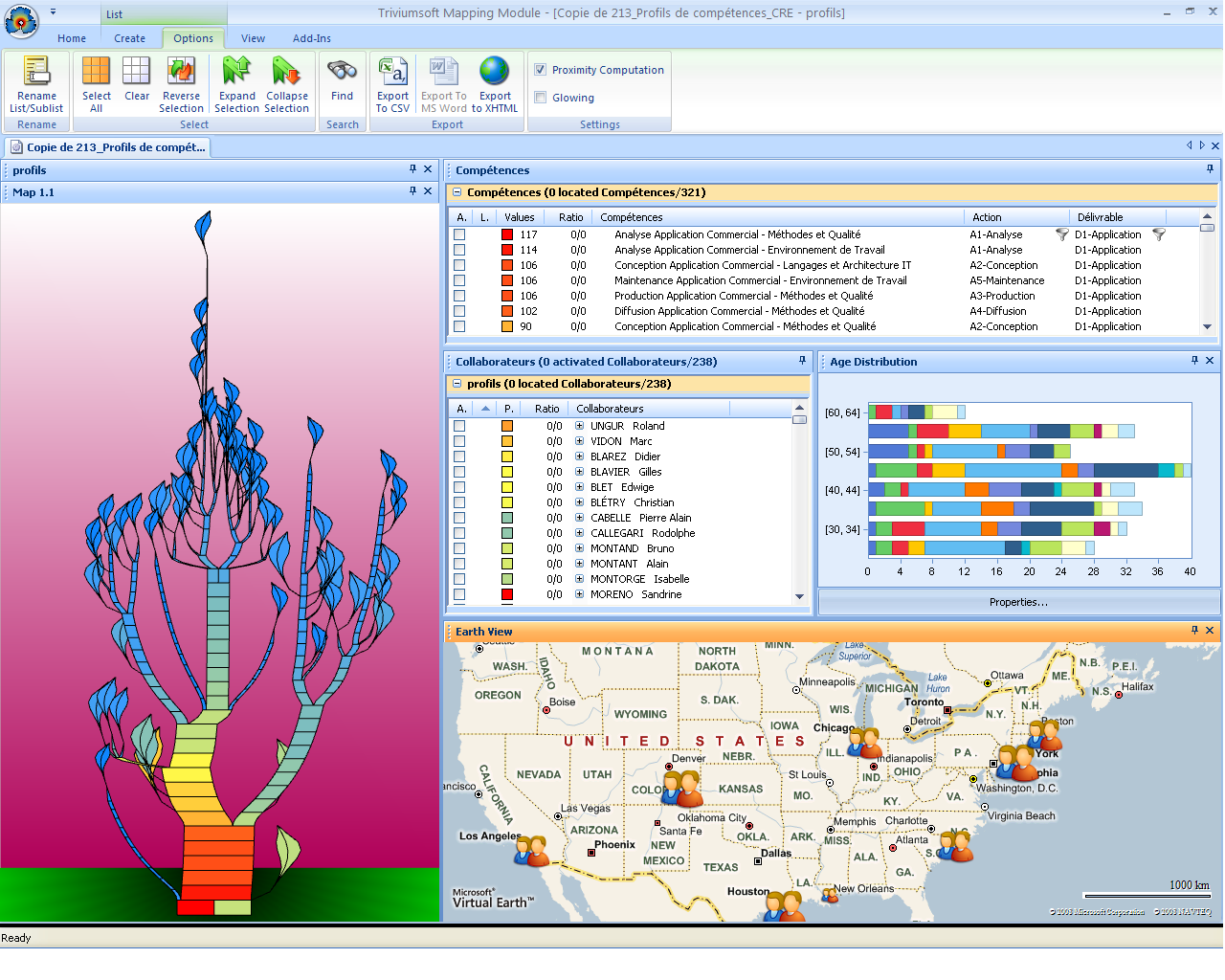 Implémentation des arbres de connaissances par TrivumSoft